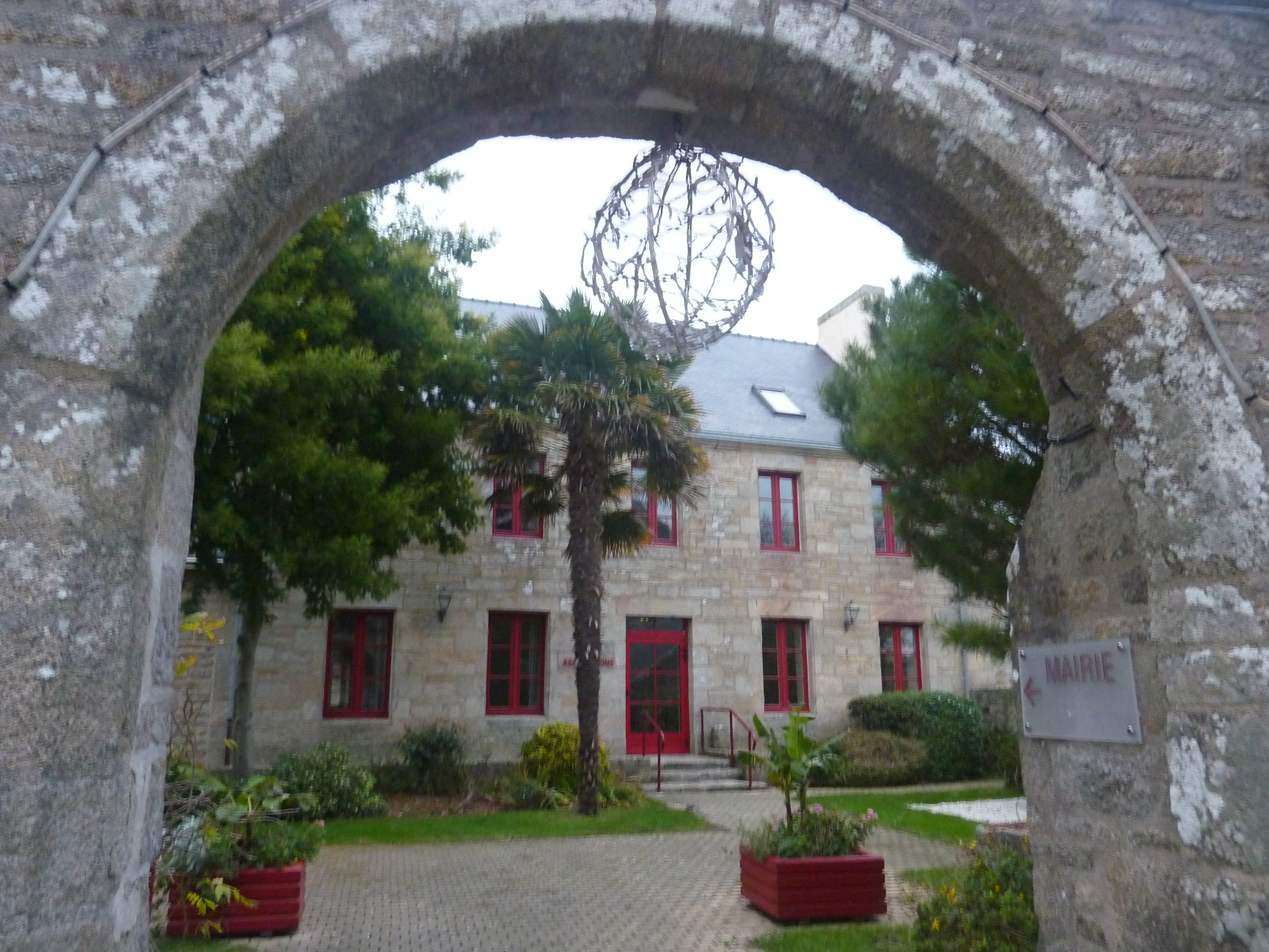 La mairie de Plobannalec